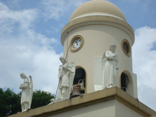 Detalle de la Iglesia de San Miguel Arcángel, Escazú, Costa Rica.